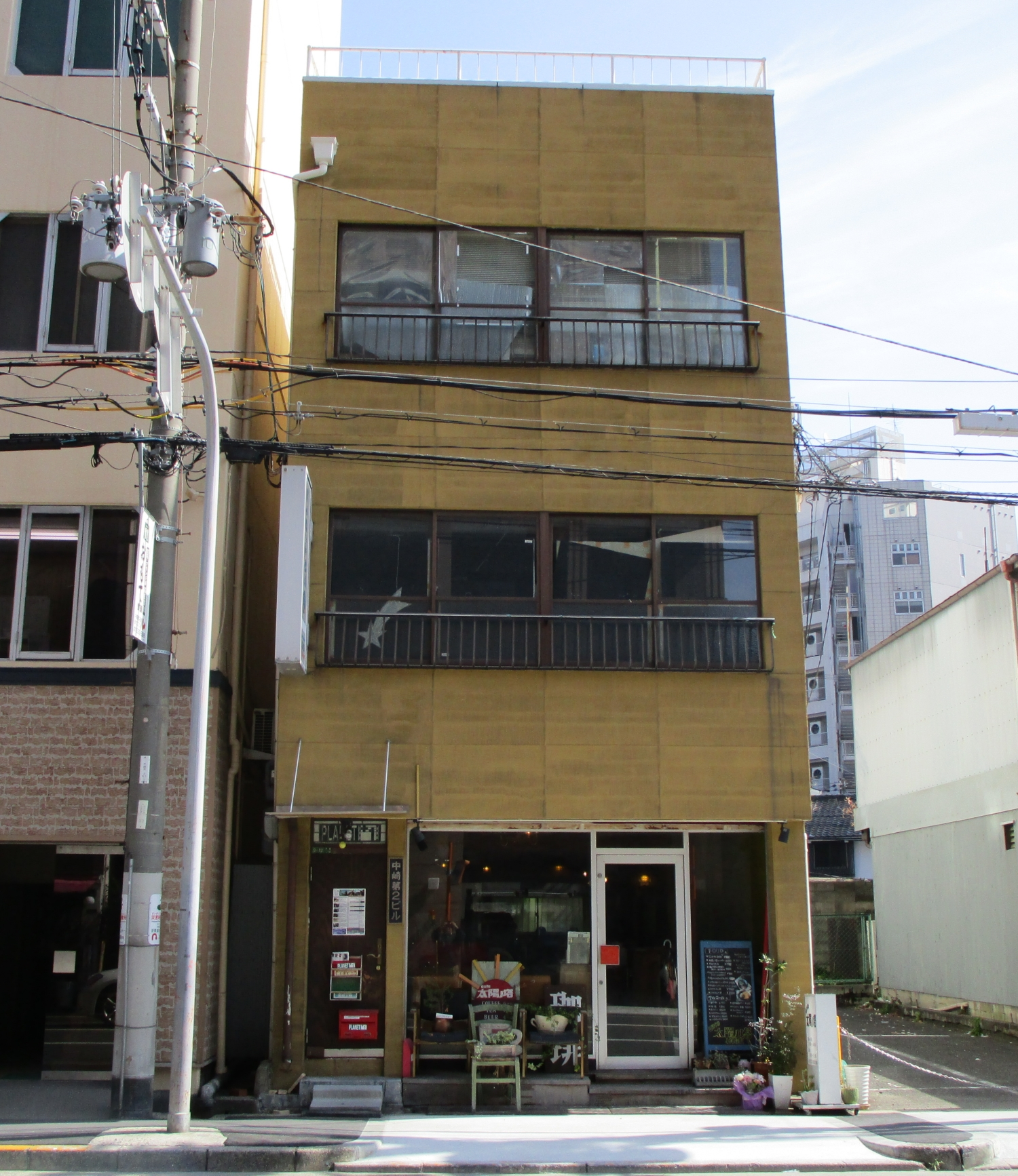 大阪市北区中崎町にある映画館、プラネットプラスワン